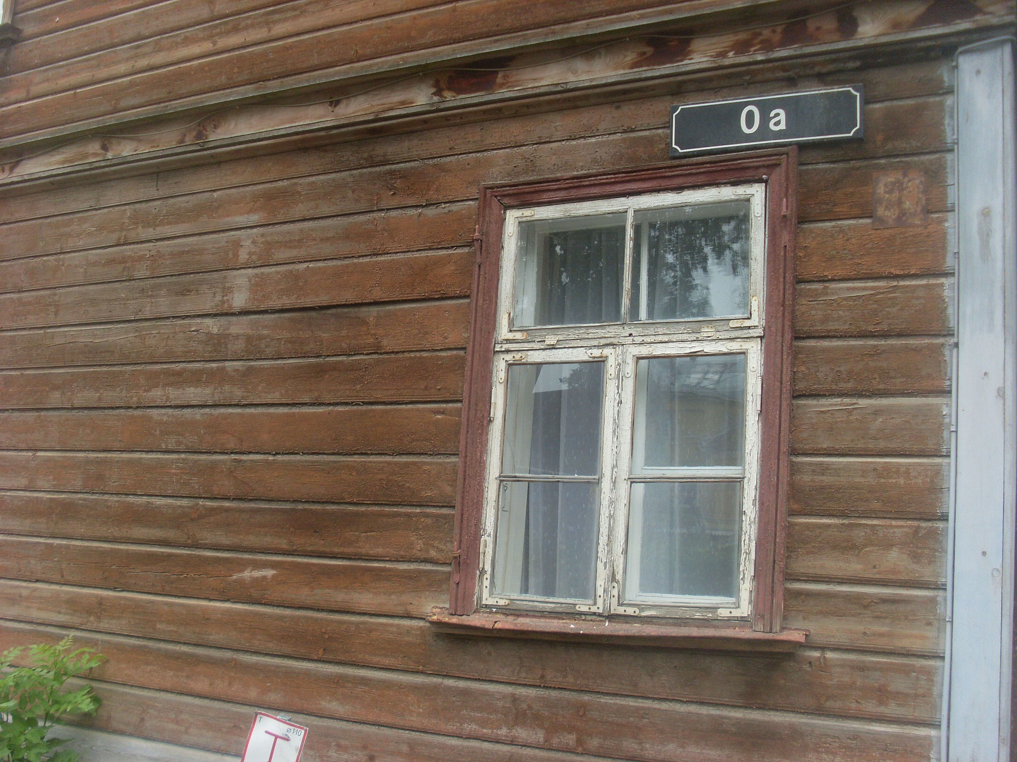 Rue 0a